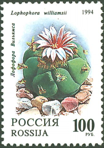 Почтовая марка России